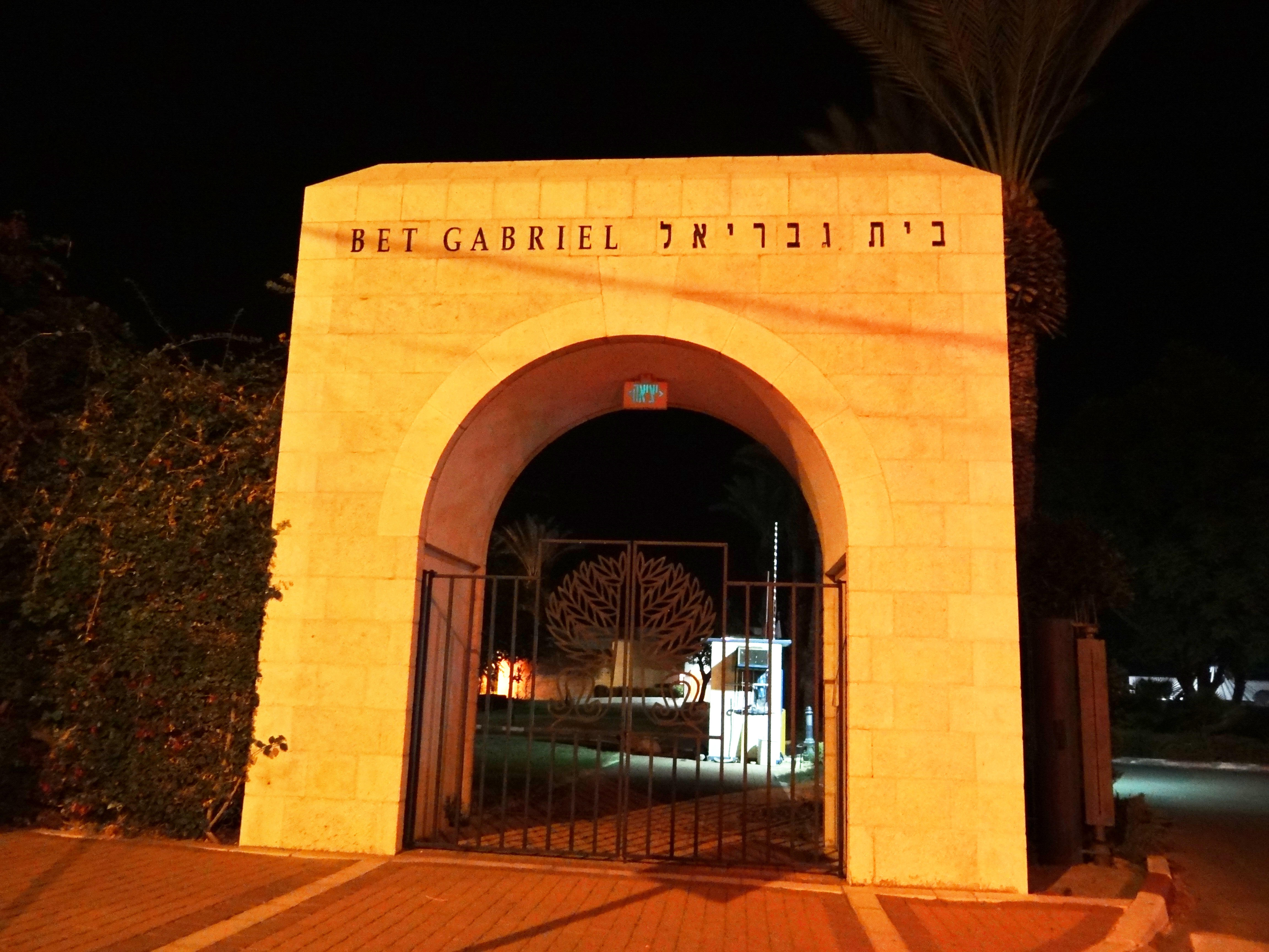 Bet Gabriel on the Kinneret בית גבריאל בכנרת הוא מרכז תרבות על שפת ים כנרת, על יד צמח.